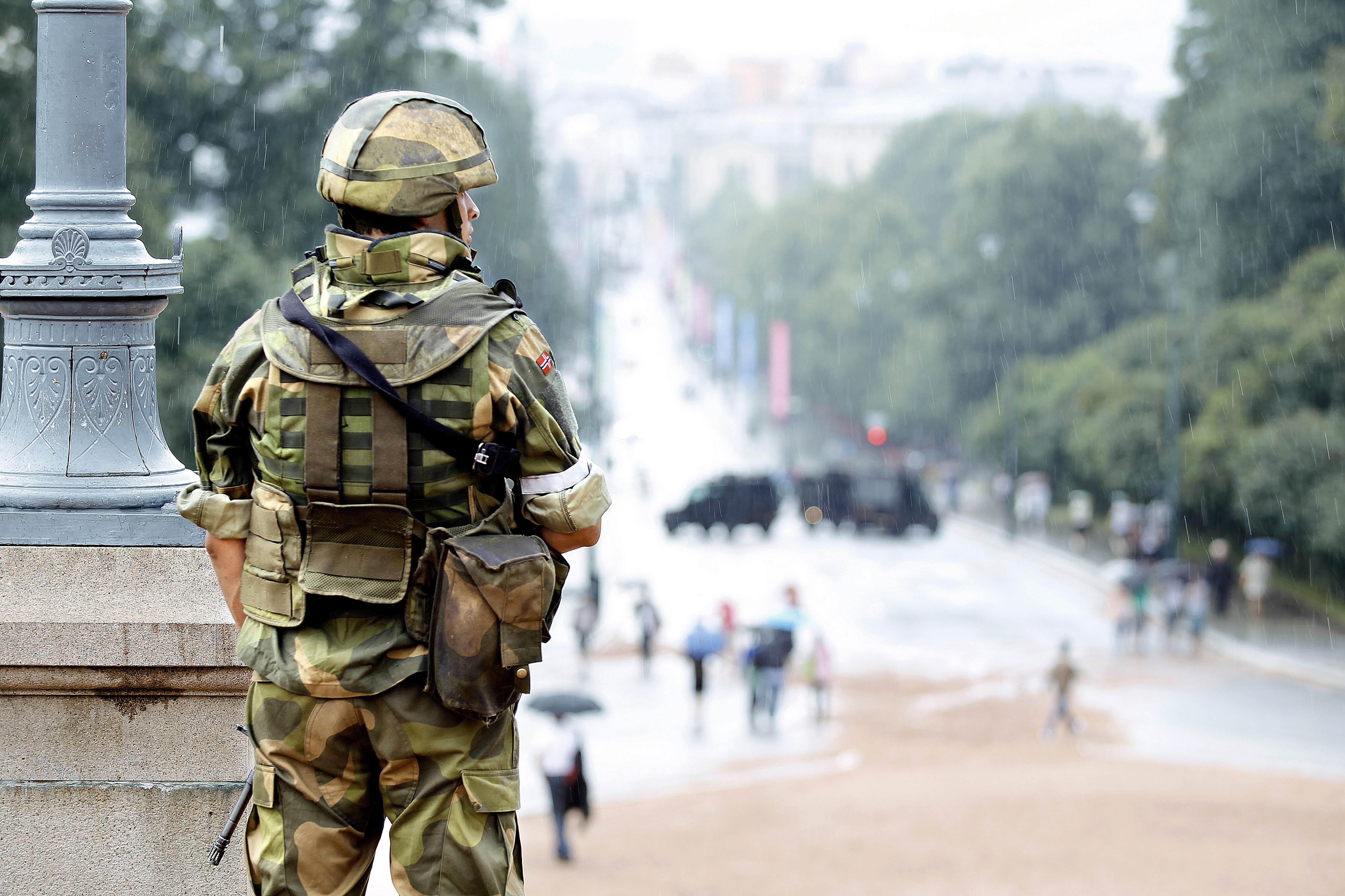 På grunn av bombetrusselen benyttet Garden sine pansrede kjøretøy til å blant annet sperre av Slottsplassen.